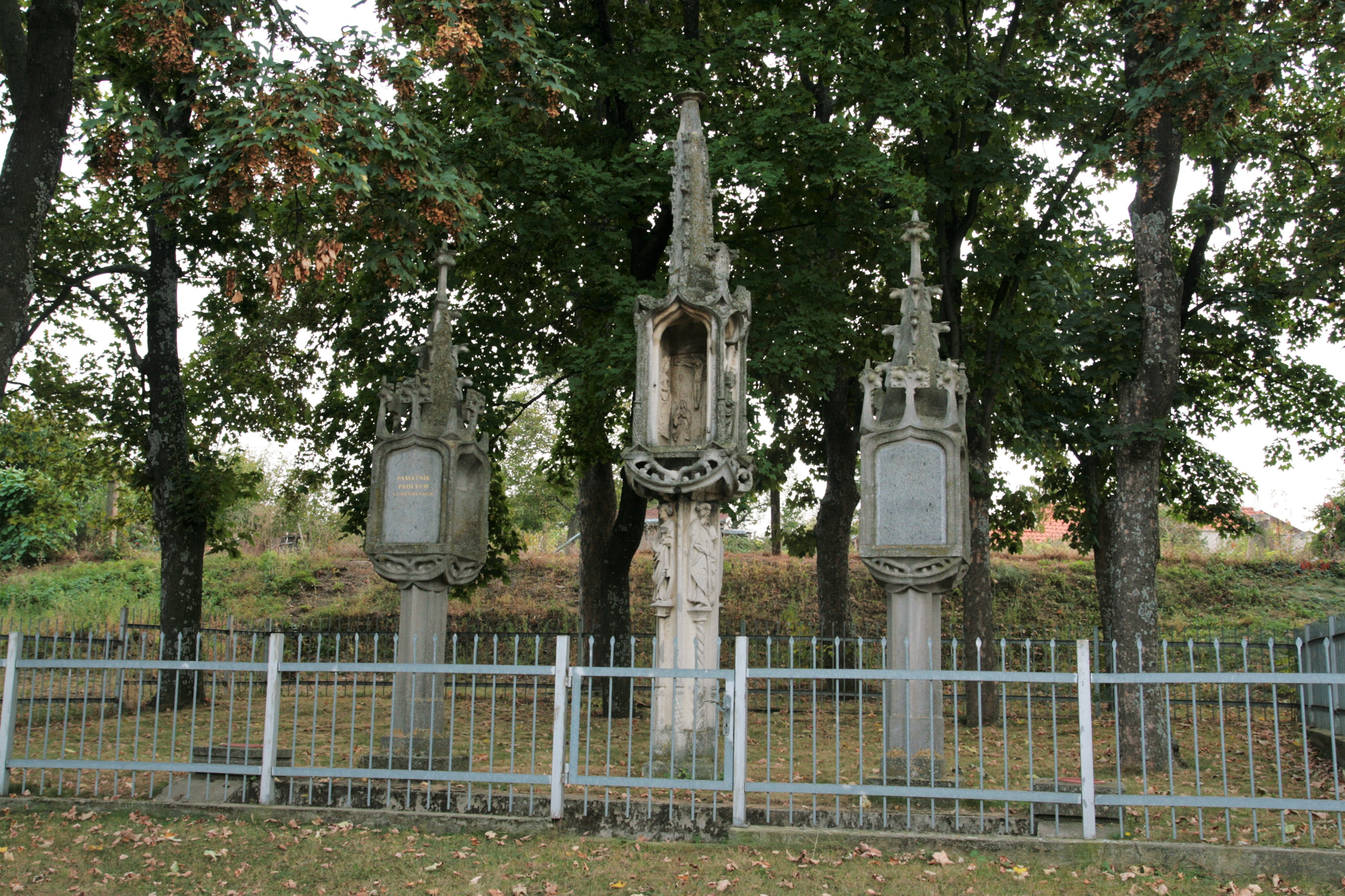 Sedlešovice, část obce Nový Šaldorf - Sedlešovice v okrese Znojmo. Trojice božích muk - prostřední pozdně gotická, postranní novogotická.